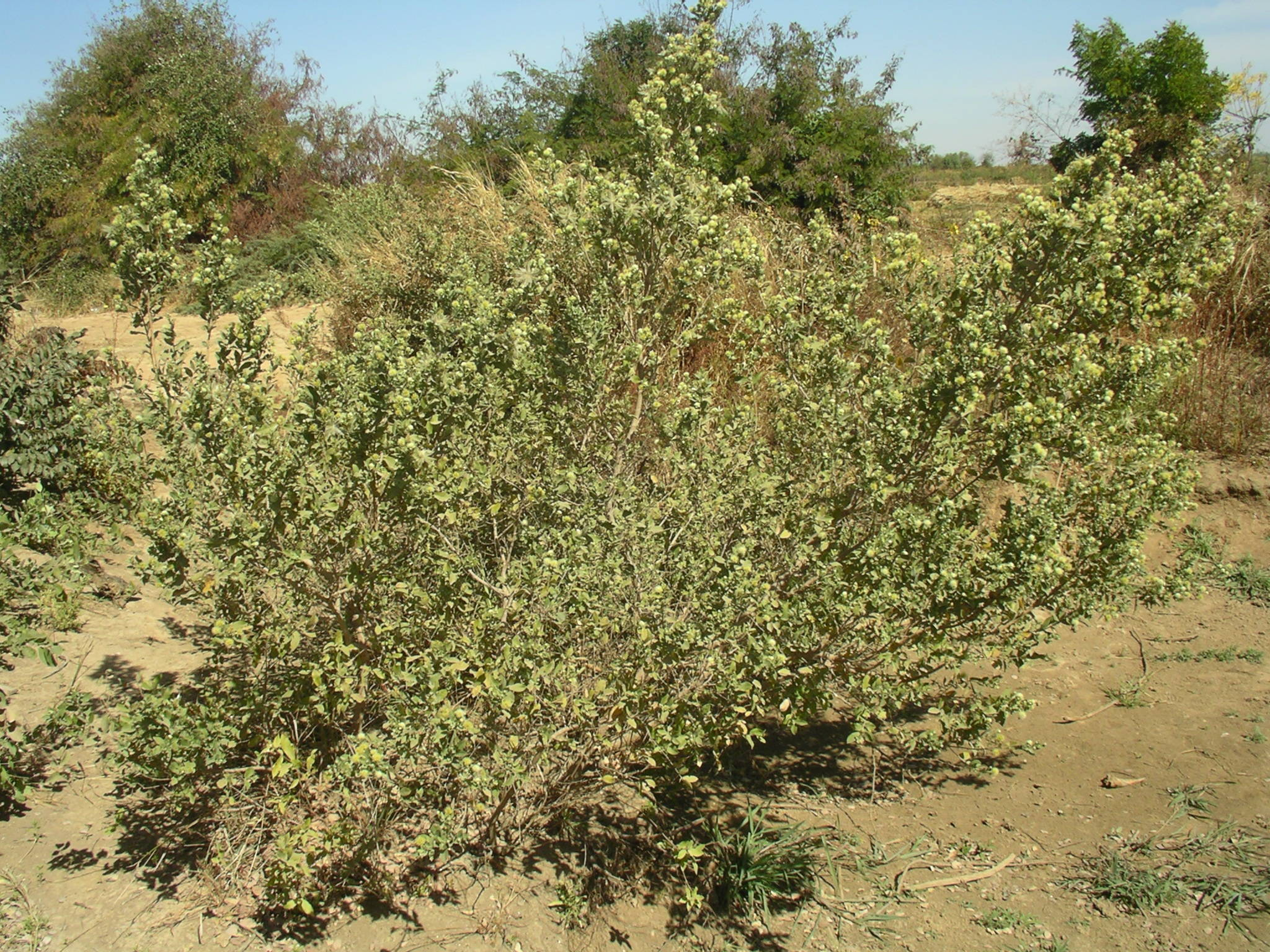 plante de Guiera senegalensis, localisation : Niono.